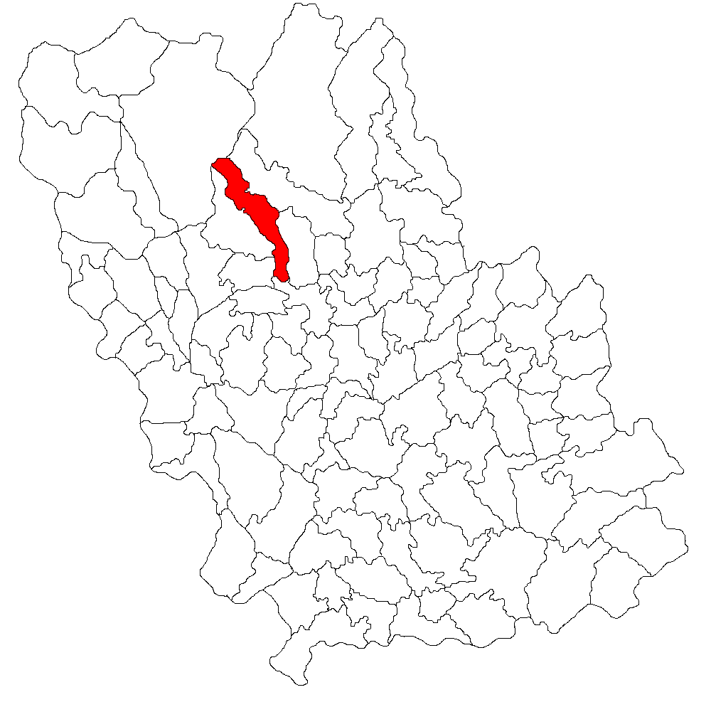 Categorie:Hărţi ale judeţului Prahova